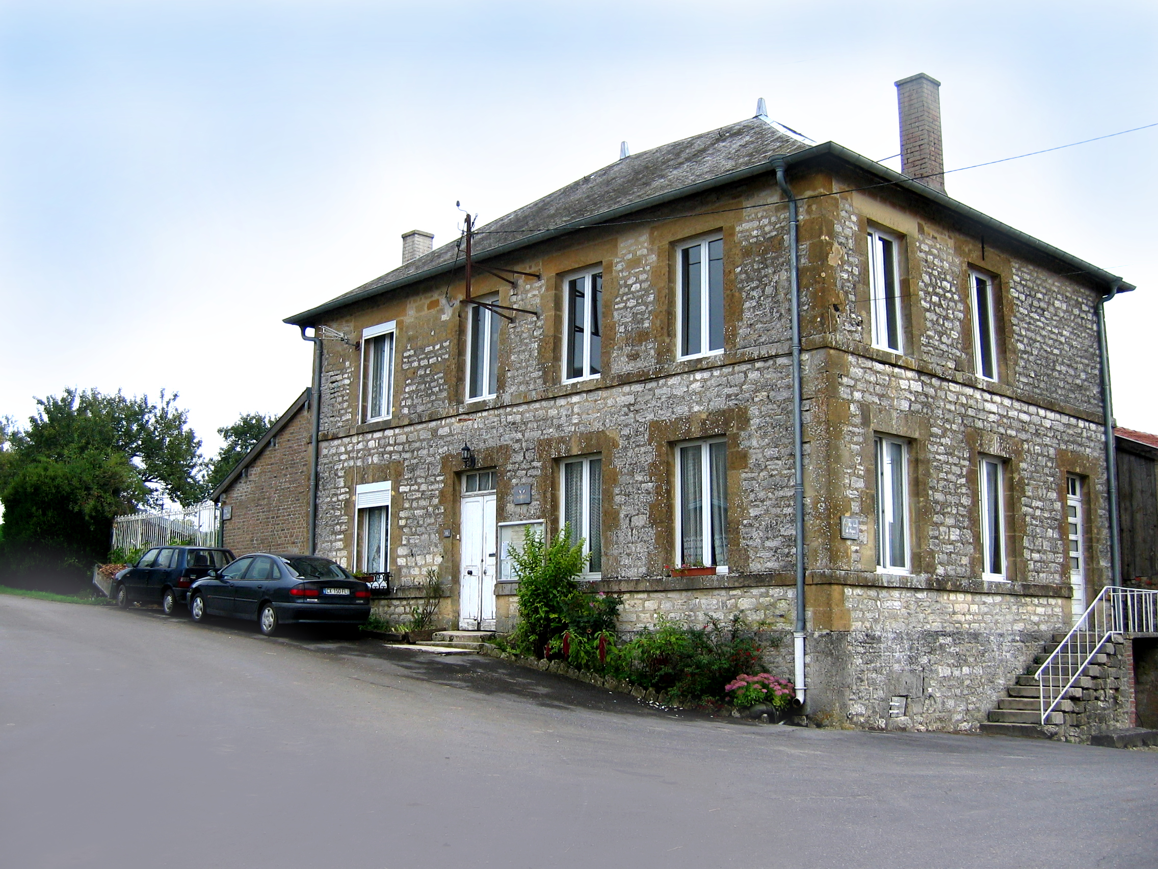 Mairie de Sommerance, Ardennes, France